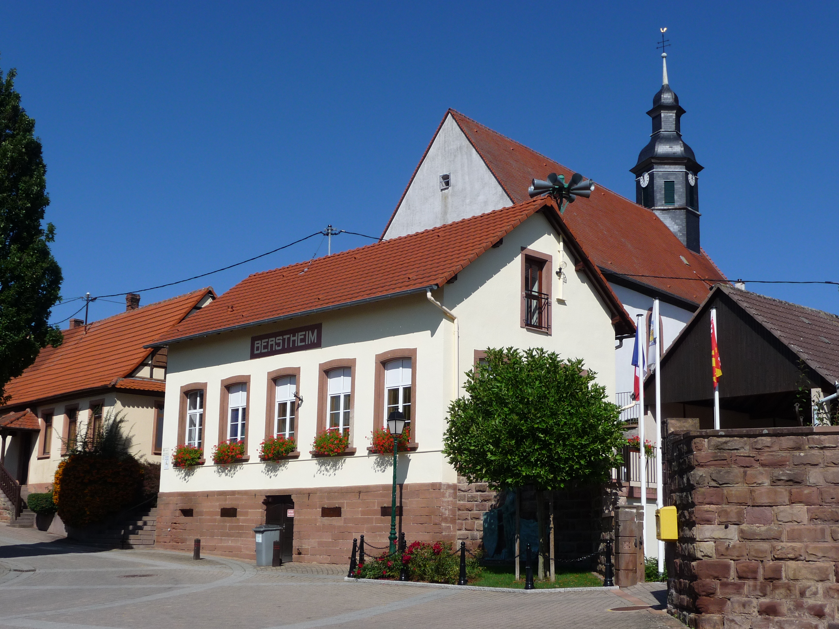 Image destinée a illustrer les pages concernant la commune de Berstheim( Bas Rhin)